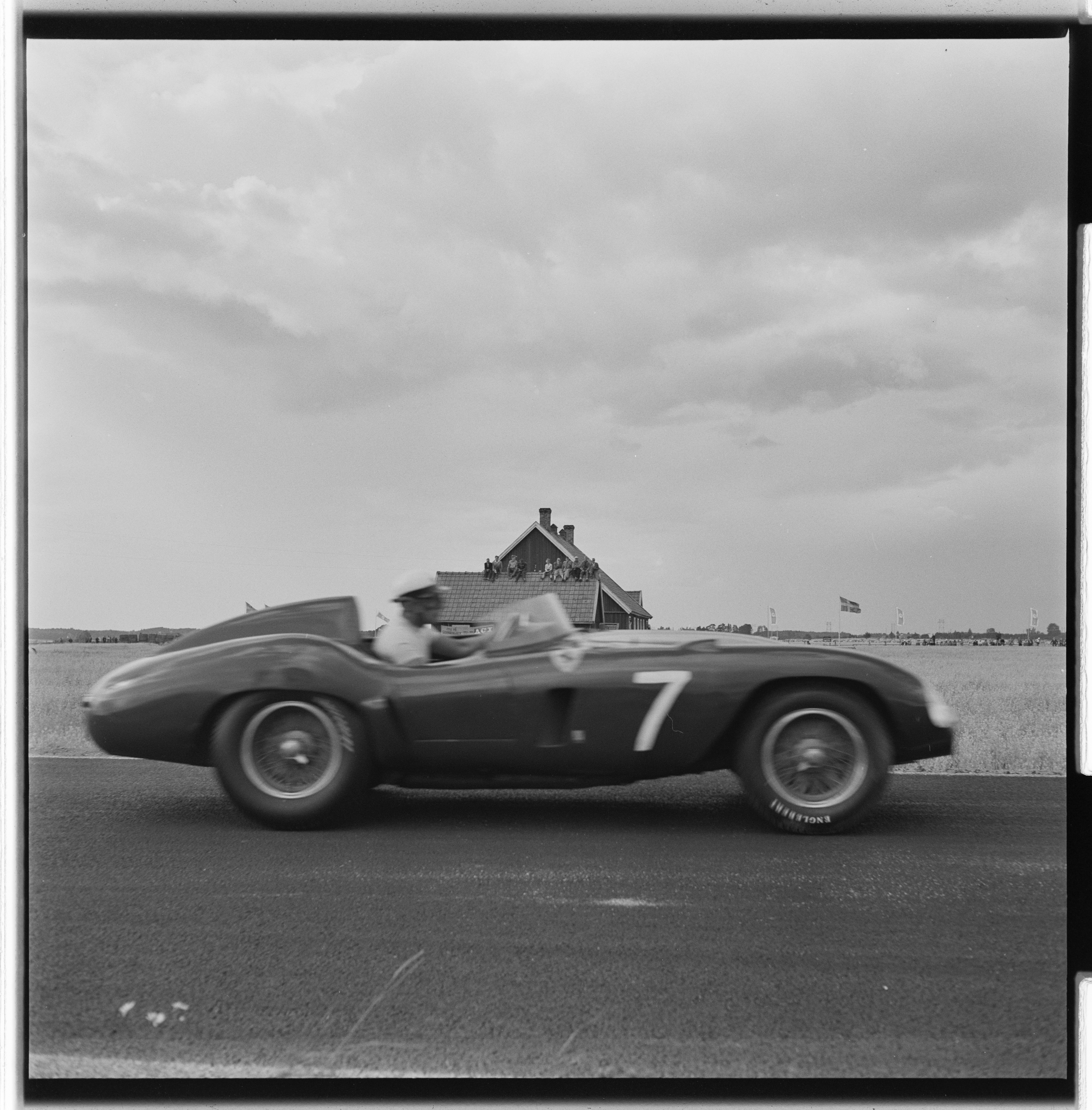 Bildet er hentet fra Arkivverket. Grand Prix i Kristianstad. NÅ nr. 33, 1955 Arkivinstitusjon : Riksarkivet Arkivnavn : Billedbladet NÅ Sted : Sverige, Skåne, Kristianstad, Råbelövsbanan Emneord: billøp, racing, motorsport Avbildet: Eugenio Castelotti in a Ferrari 121 LM finished third after Fangio and Moss